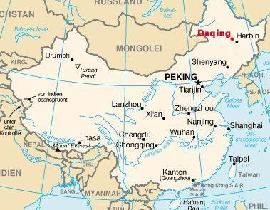 Lage der Stadt Daqing Als Bild wurde von Bild:Changchun Lage.jpg genommen und der Punkt versetzt.